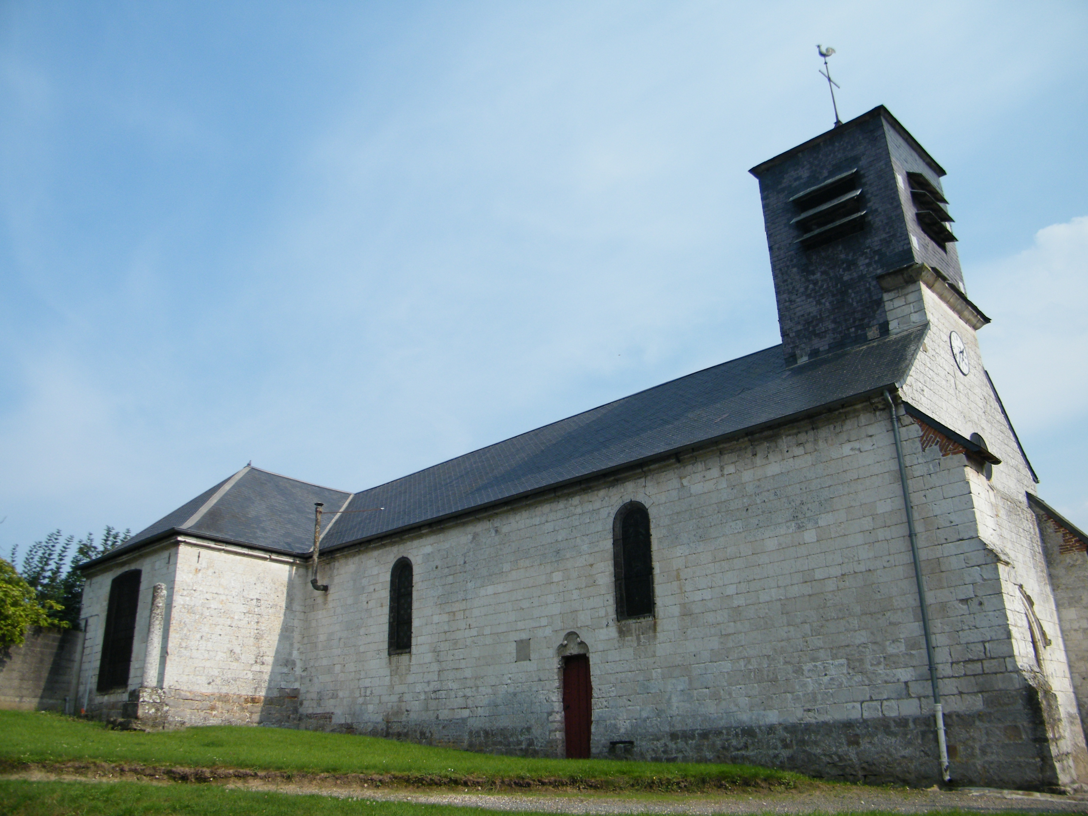 L'église Saint-Martin de Pernois, Somme, France.